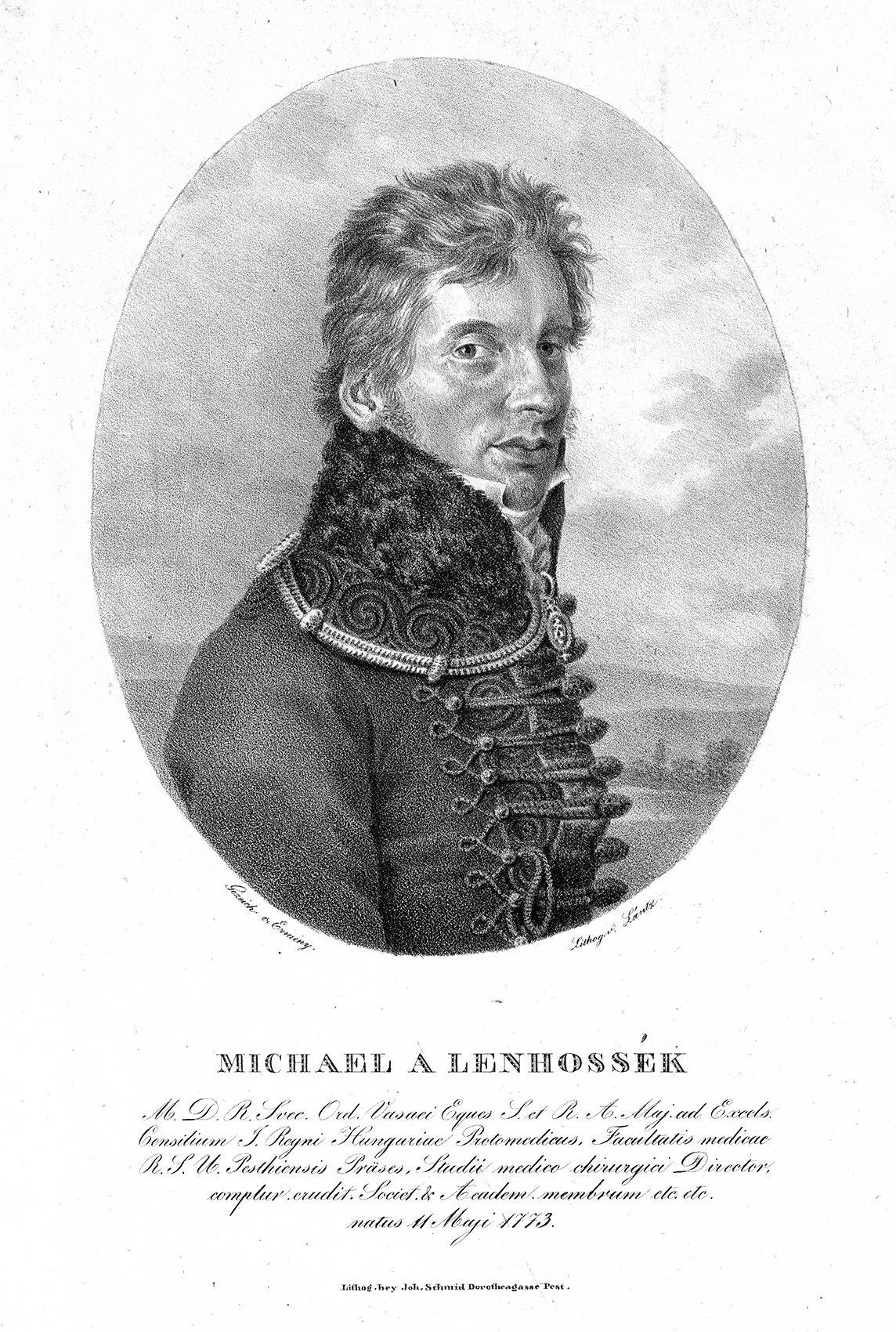 Lenhossék Mihály Ignác, Linoschegg (Pozsony, 1773. május 11. – Buda, 1840. február 12.) orvosdoktor, egyetemi tanár, Magyarország főorvosa s helytartósági tanácsos. Fia Lenhossék József (1818–1888) orvos, anatómus, antropológus, unokája Lenhossék Mihály (1863–1937) orvos, dédunokája Szent-Györgyi Albert (1893–1986) Nobel-díjas tudós.